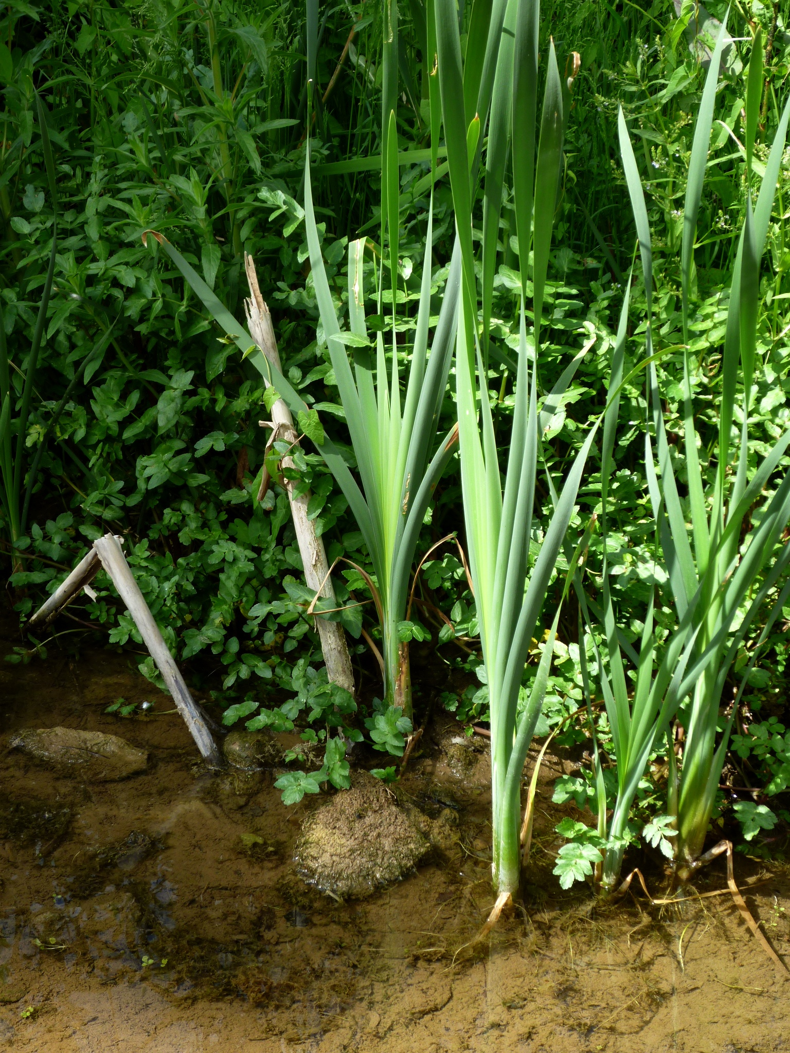 Zona humida de la Riera de Navel (Berguedà): boga al segon pantà This is a a photo of a wetland in Catalonia, Spain, with id: IZHC-08001406